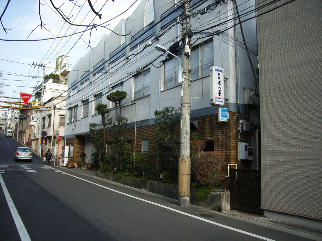 Japanese-Inn (Ryokan) "Sawanoya" at Yanaka, Tokyo